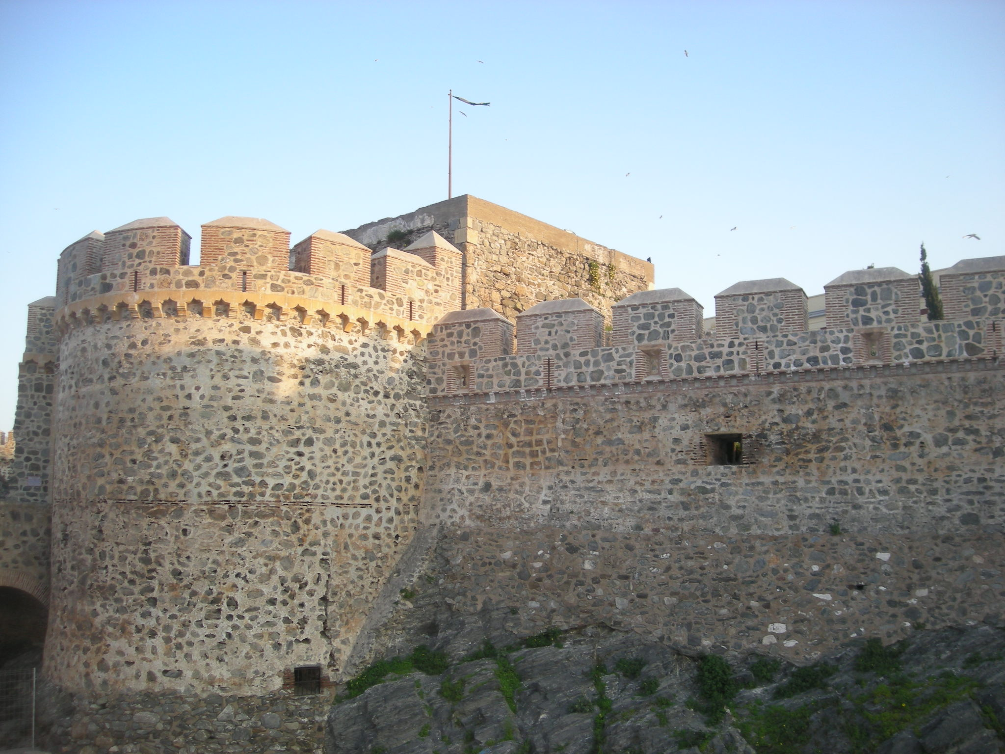 Castillo de San Miguel en Almuñécar, (Granada).